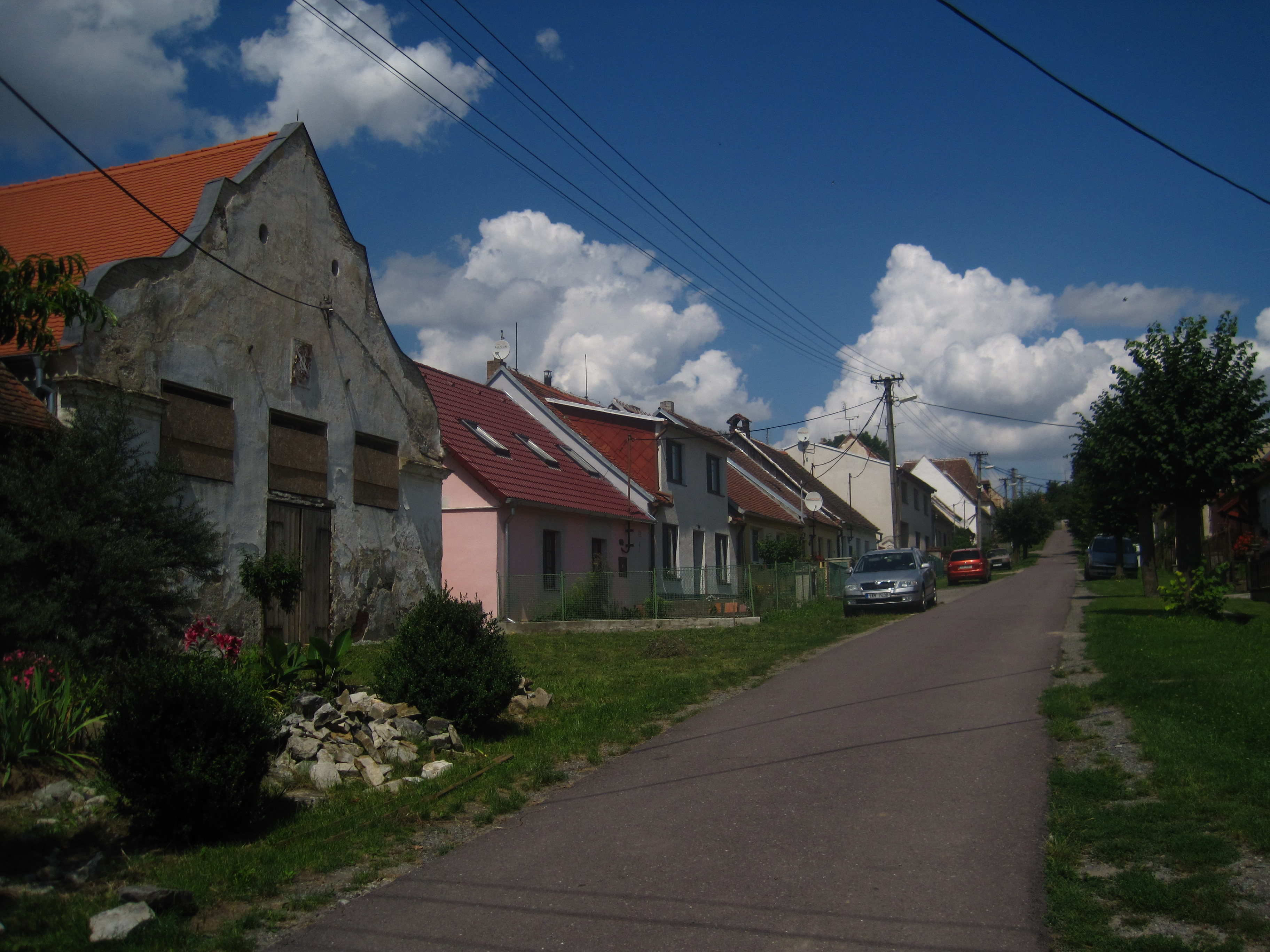 Synagoga, Police 116, Police (okres Třebíč).